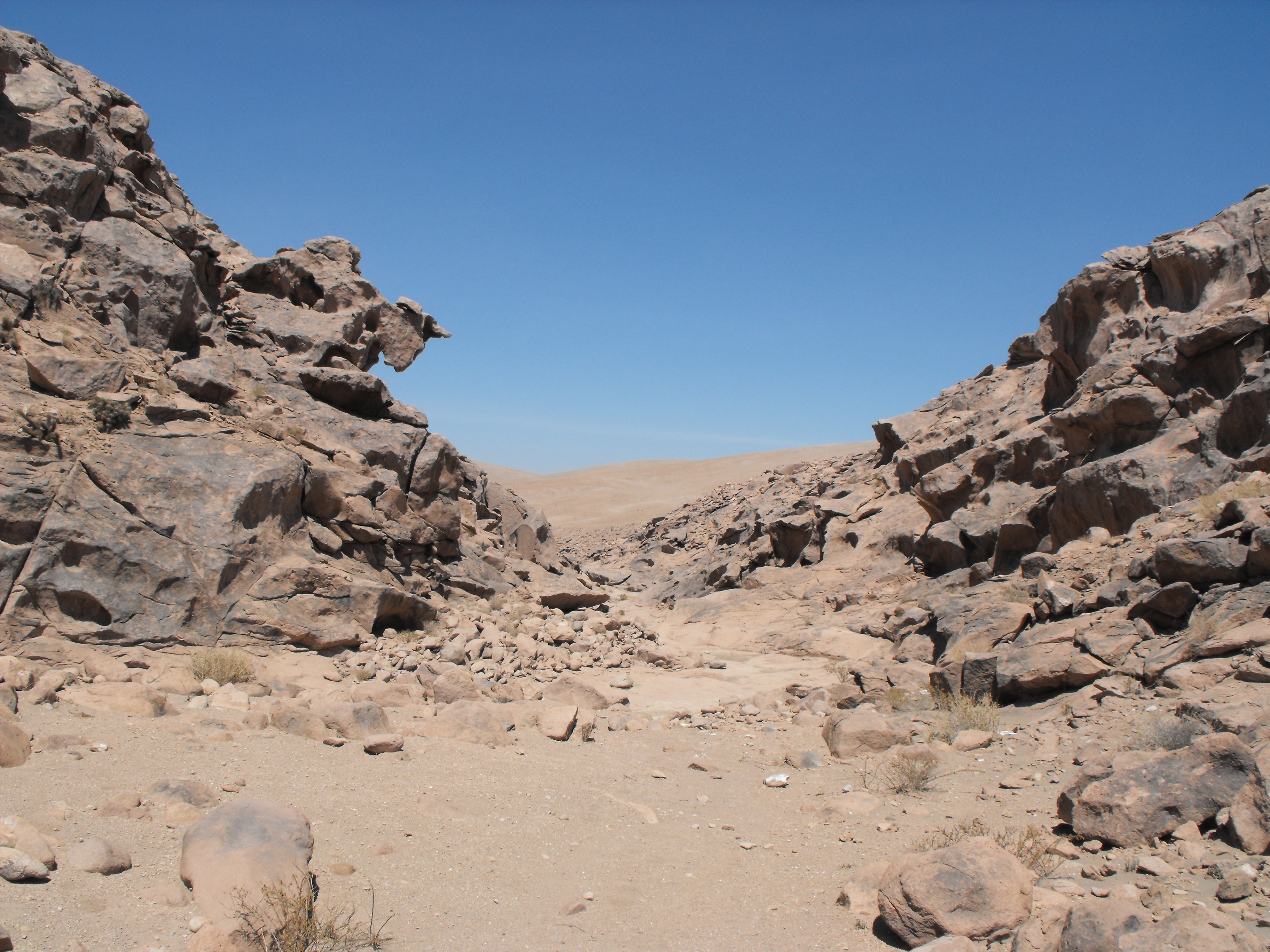 quebrada el tambillo